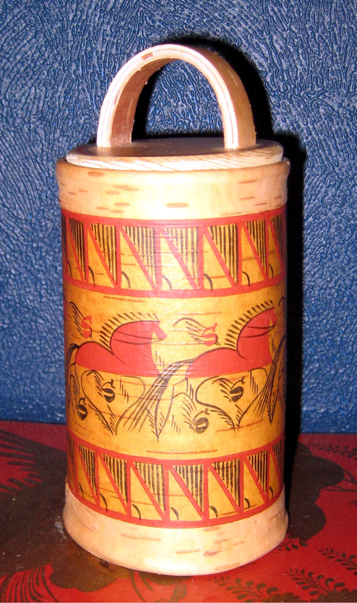 Берестяной туес. Мезенская роспись. Мастер Александр Владимирович Шутихин. (Магазин "Сувениры и подарки из бересты", павильон №1 "Центральный"